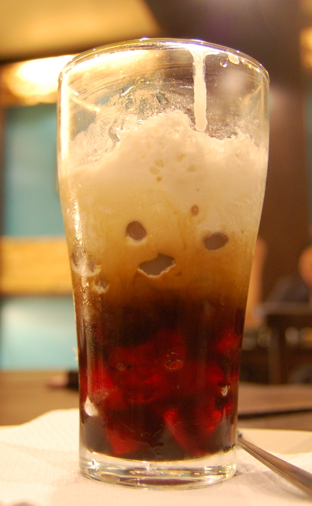 Smallville, Diversion Road, Ilolo City